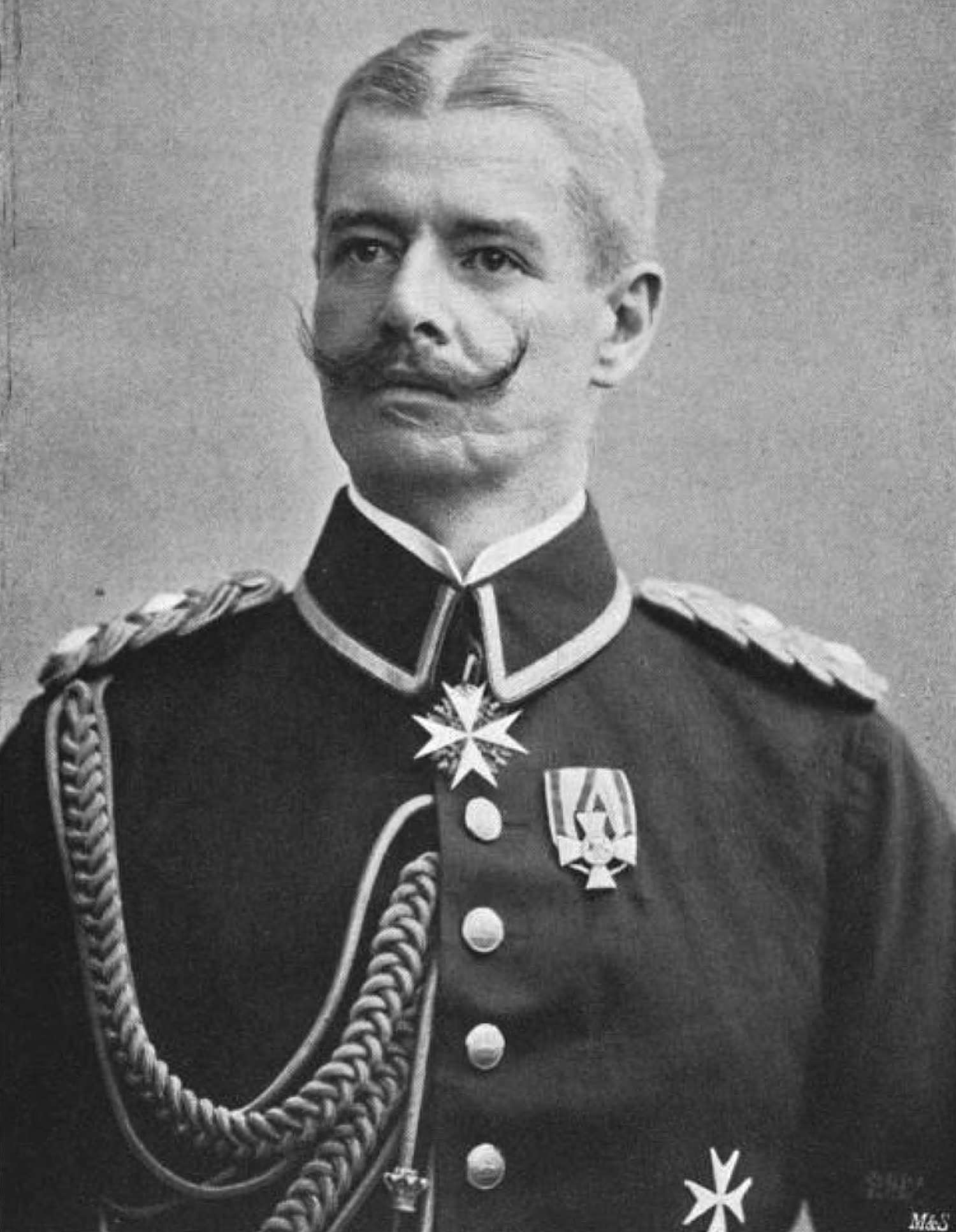 'Jesco von Puttkamer, Kaiserlicher Gouverneur von Kamerun und General-Konsul des Deutschen Reiches für die fremden Besitzungen in West-Afrika.'